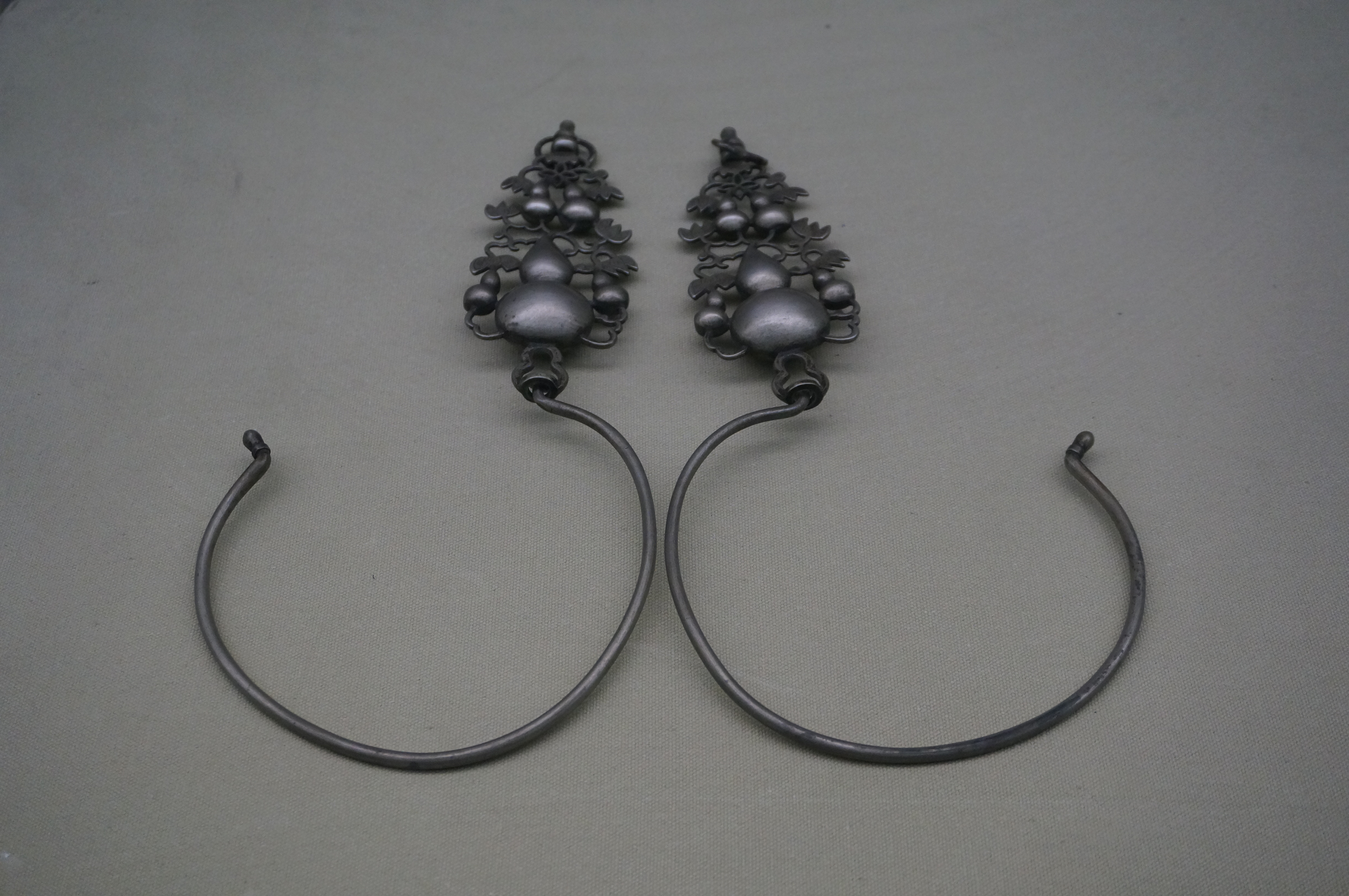 葫芦形白铜帐钩，陈章根收藏，余姚博物馆展出。